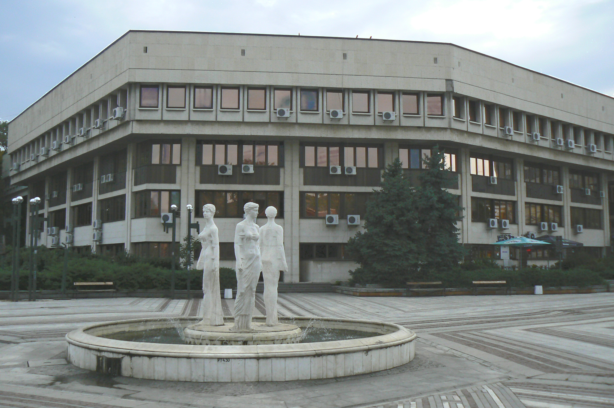 Сградата на Видинската филхармония и фонтана на Трите грации